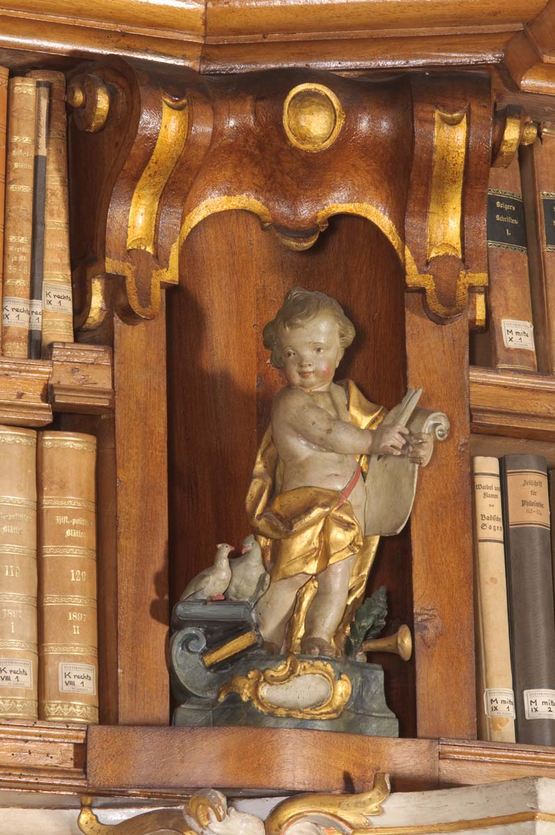 Putte Komponist als eine von insgesamt 20 Putten in der Stiftsbibliothek St.Gallen